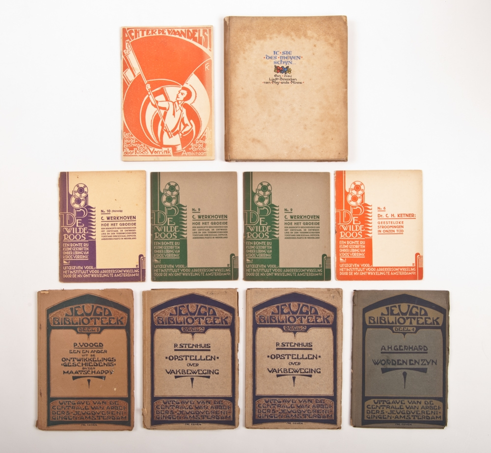 Achter de vaandels! Een nieuwe jeugd, een nieuwe taak door Koos Vorrink, Amsterdam, AJC, ca. 1932, 24 p., met omslag ontwerp Fré Cohen + De Wilde Roos, een bonte rij kleine geschriften onder leiding van Koos Vorrink, AJC, 1927-28, 4 dln. uit de reeks